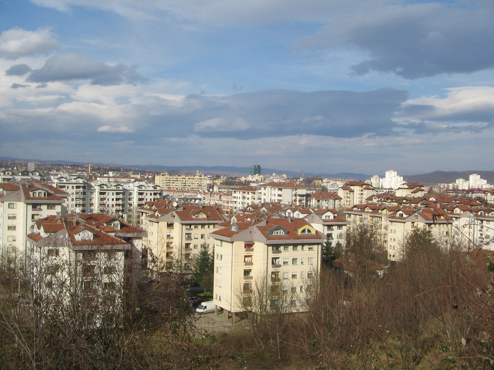 Banjalučko naselje Obilićevo.